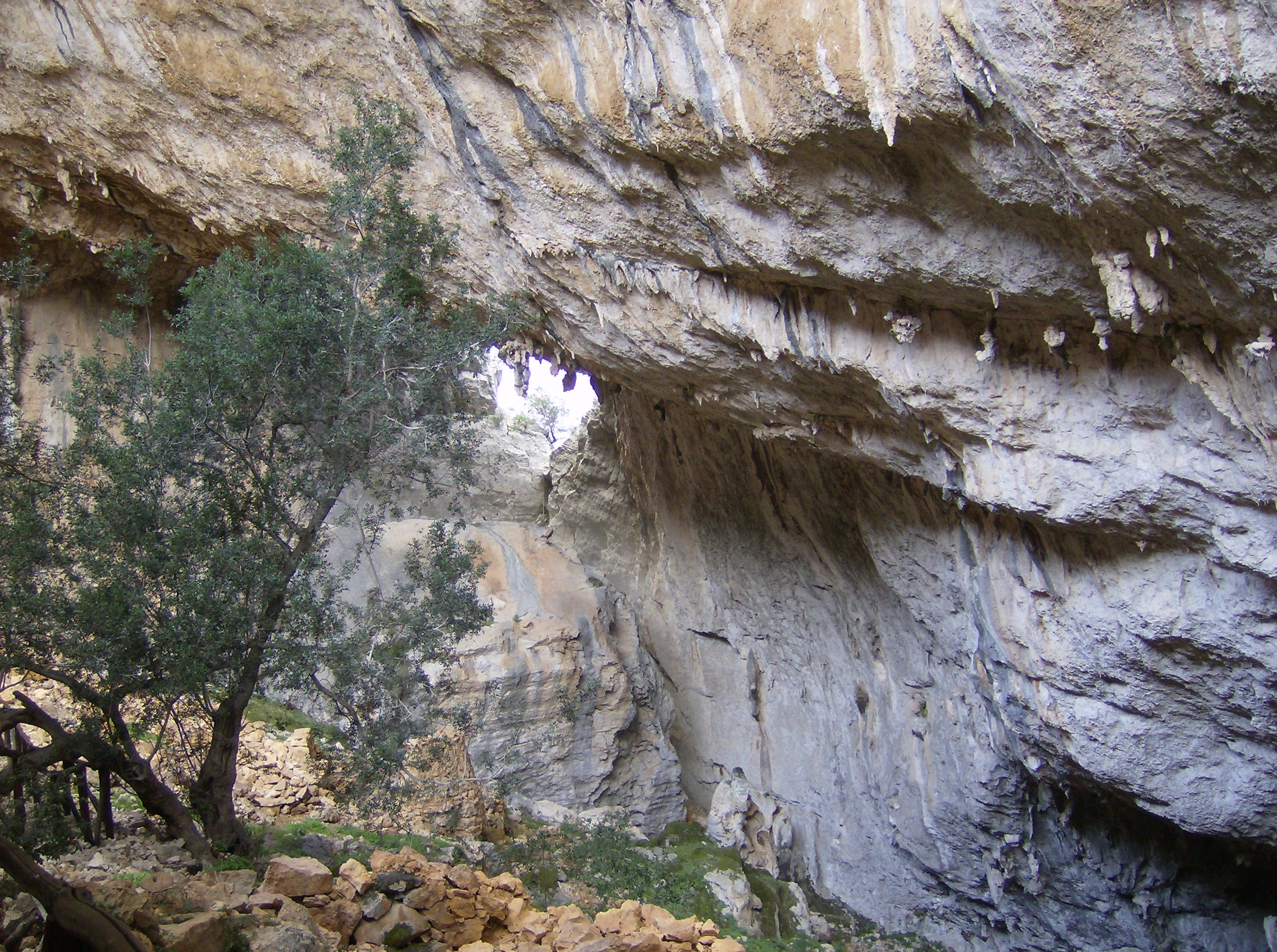 Tiscali, Sardinië